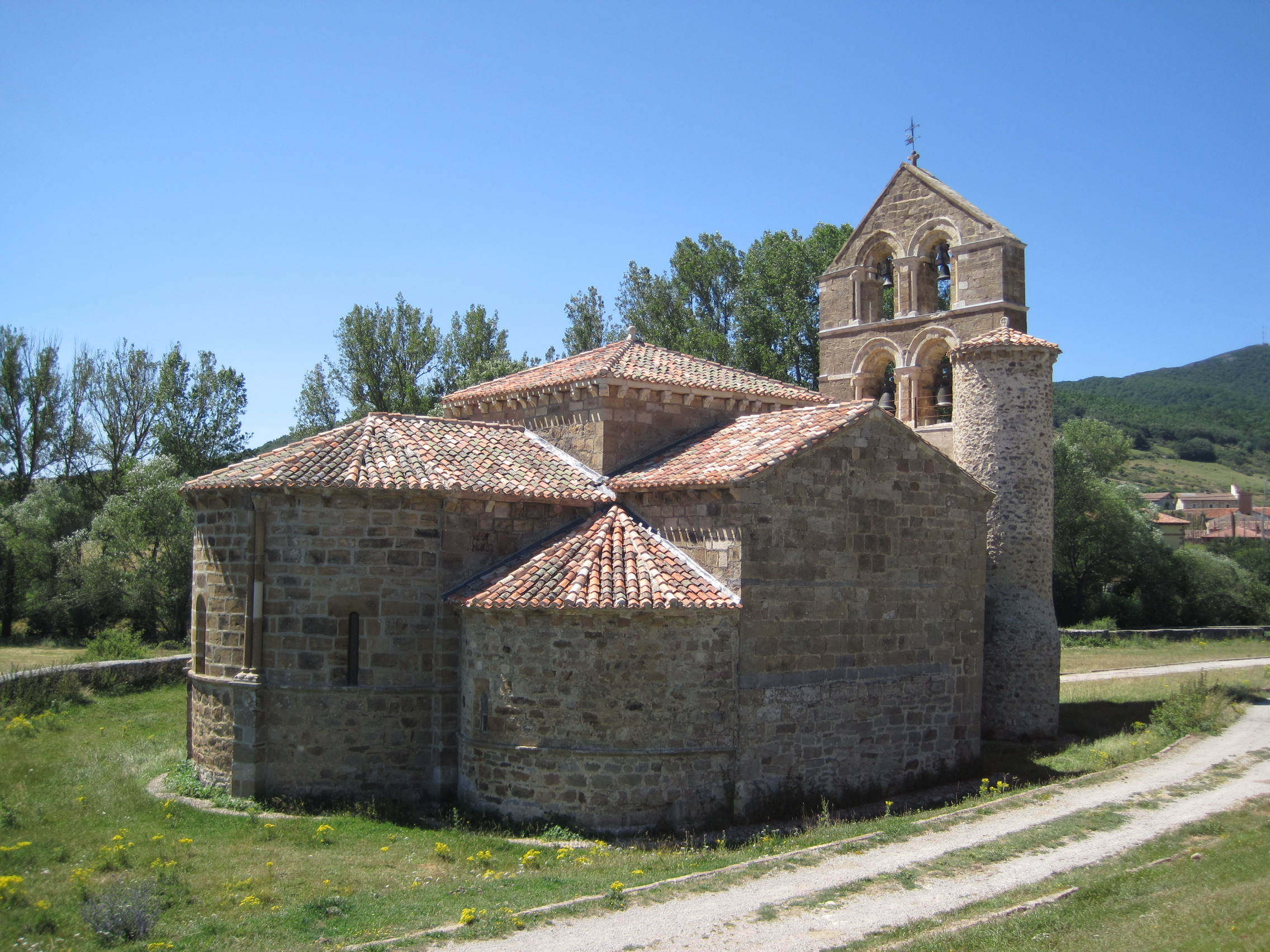 Vista lateral de la iglesia de San Salvador de Cantamuda (Palencia, España).